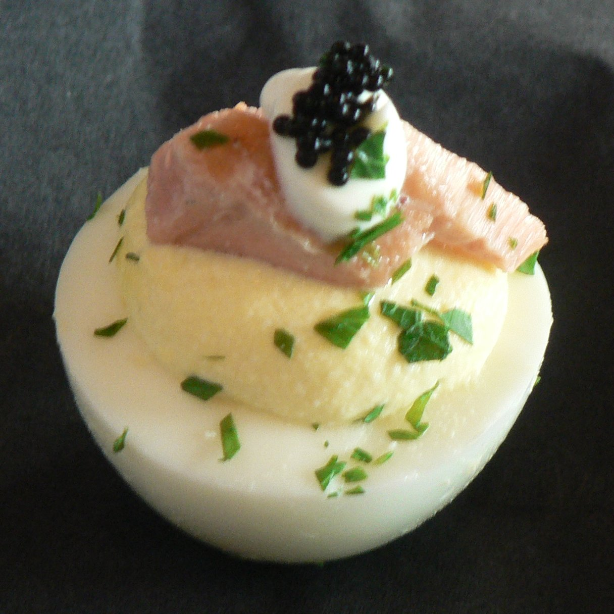 a deviled egg.